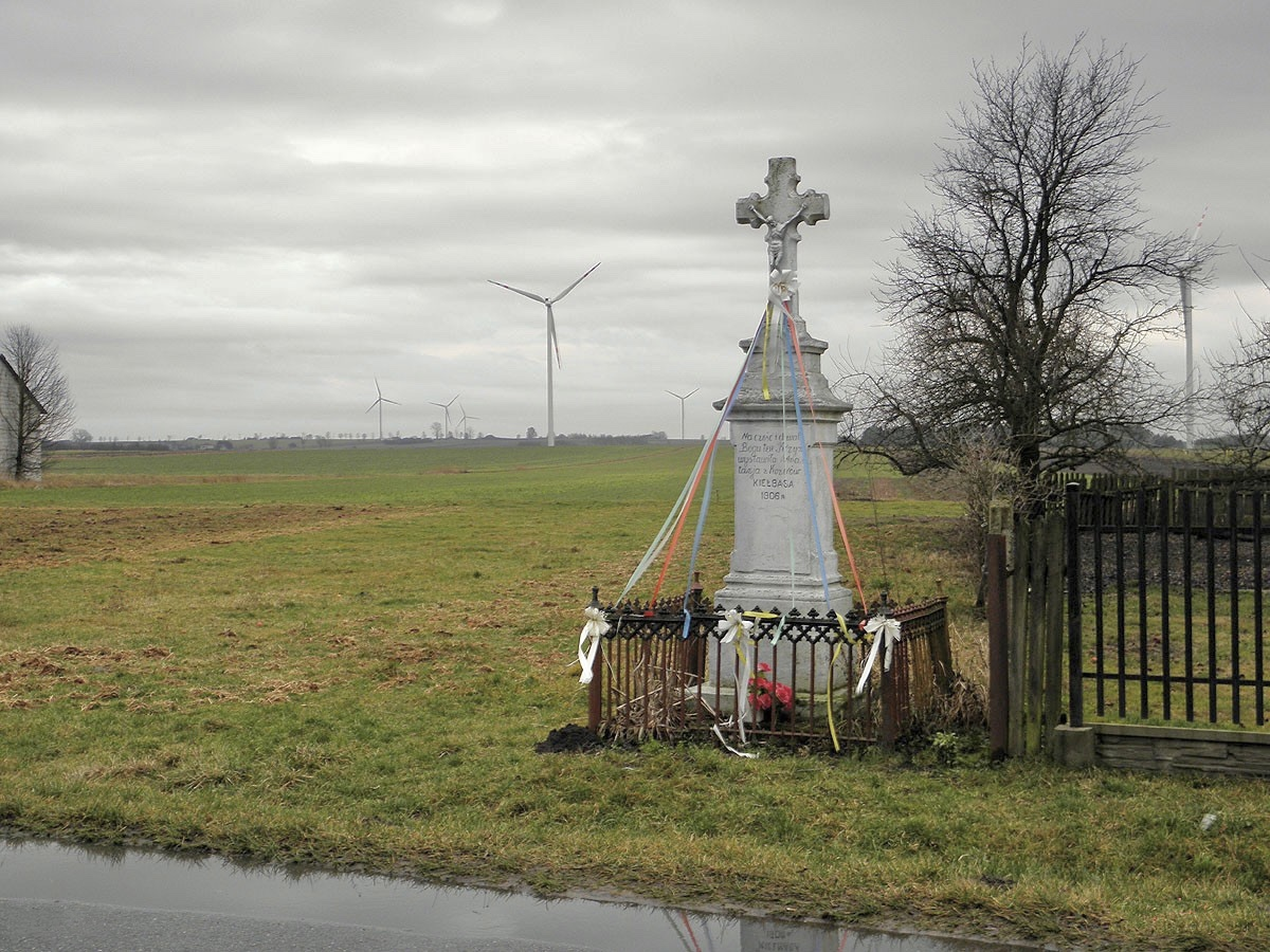 Krzyż przydrożny w podiłżeckiej Gaworzynie. W tle wiatraki Farmy Wiatrowej Iłża.